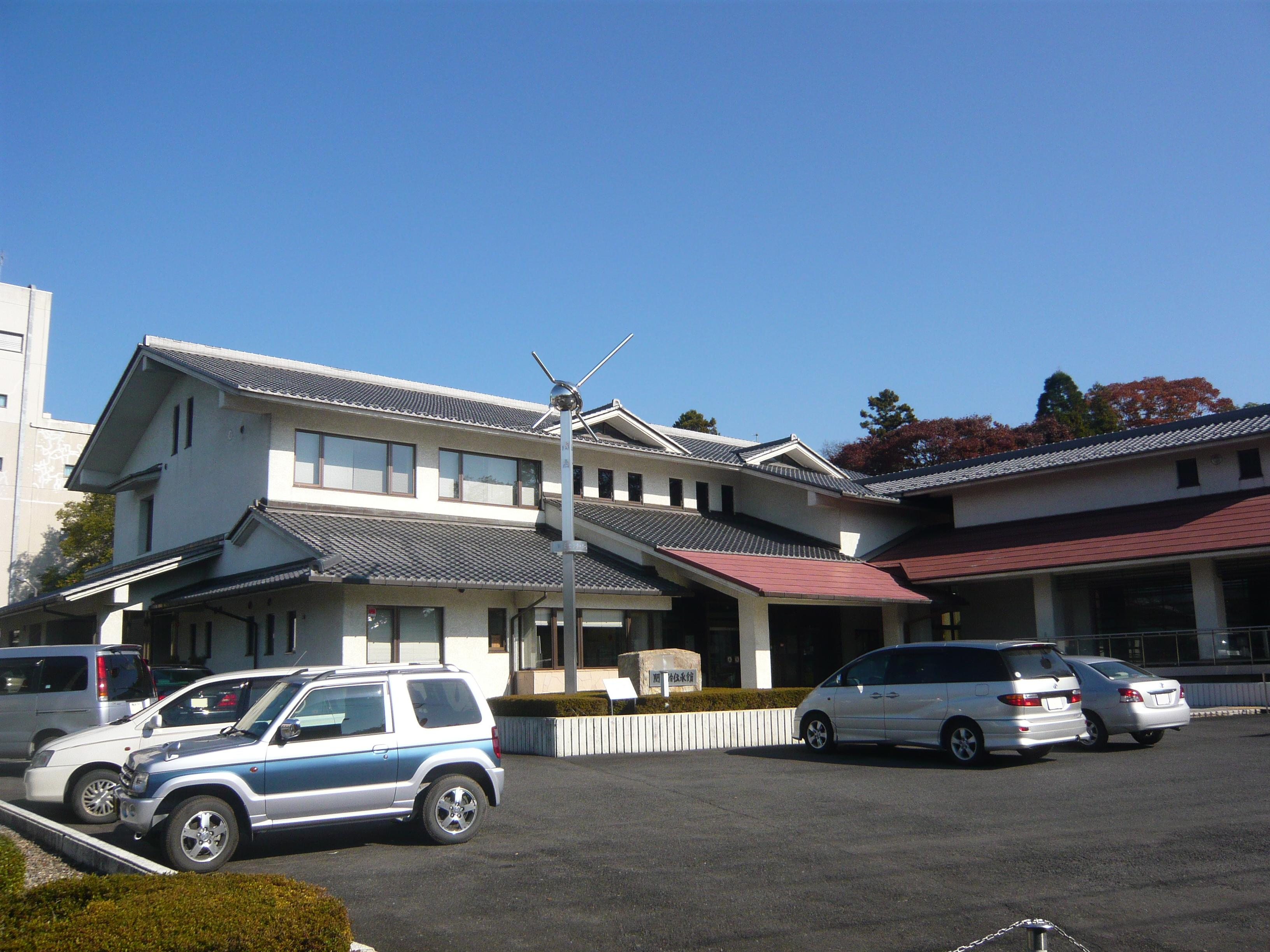 Seki Sword Tradition Museum 関鍛冶伝承館（関鍛冶伝承館）,Seki,Gifu,Japan（岐阜県関市）で撮影。